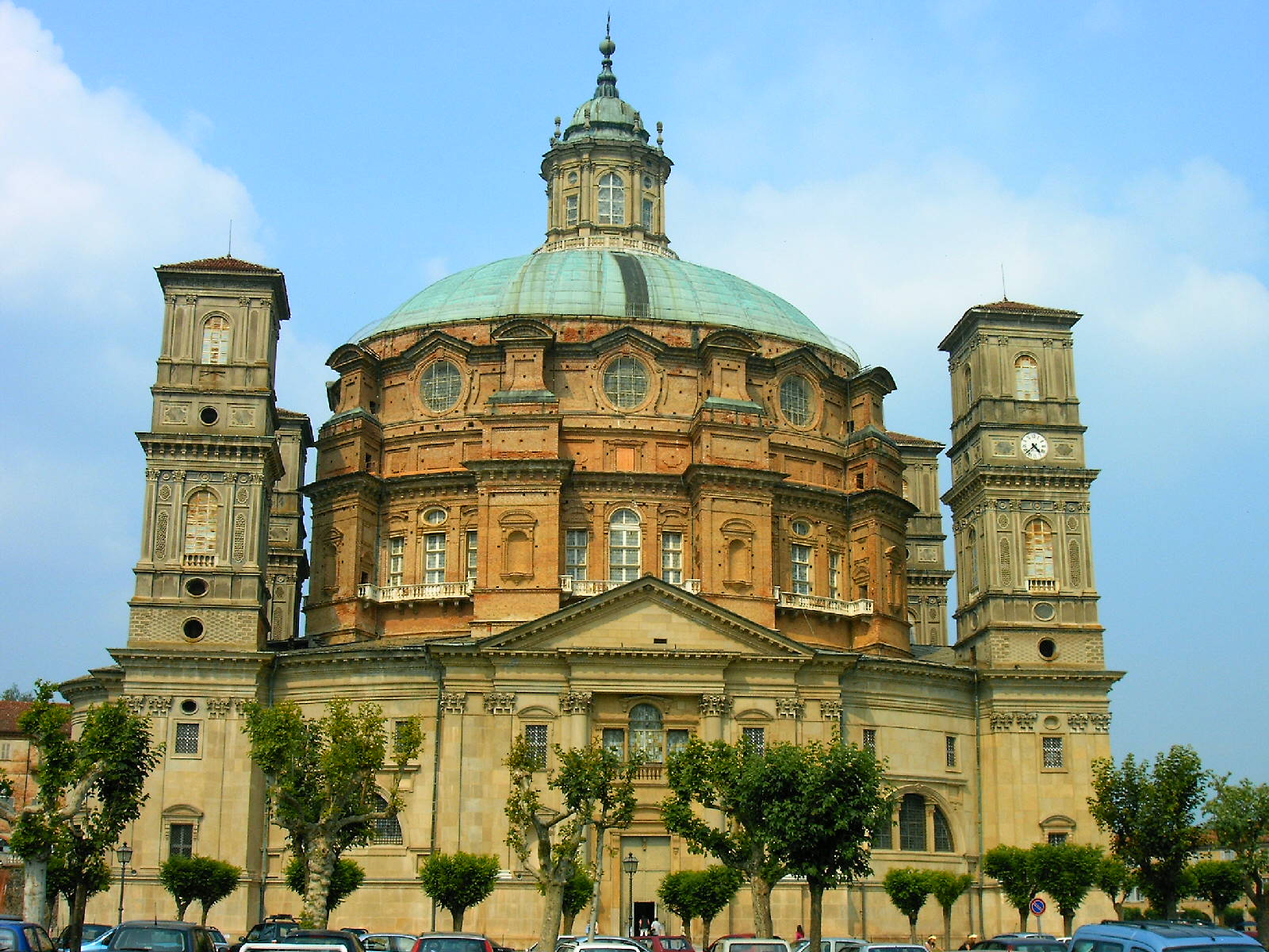 Santuario di Vicoforte (CN, Italy) - left side